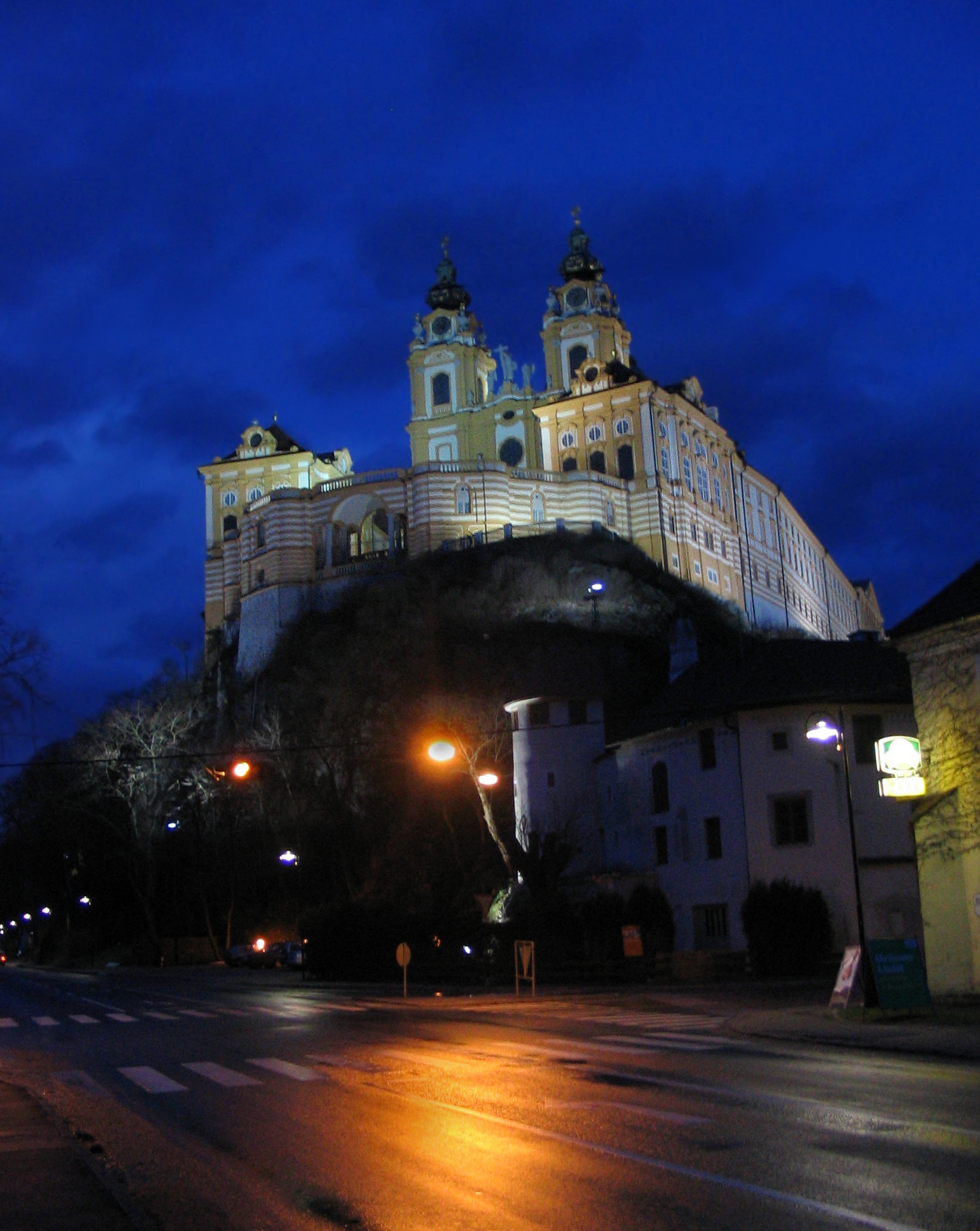 Die Melker Stadtkirche